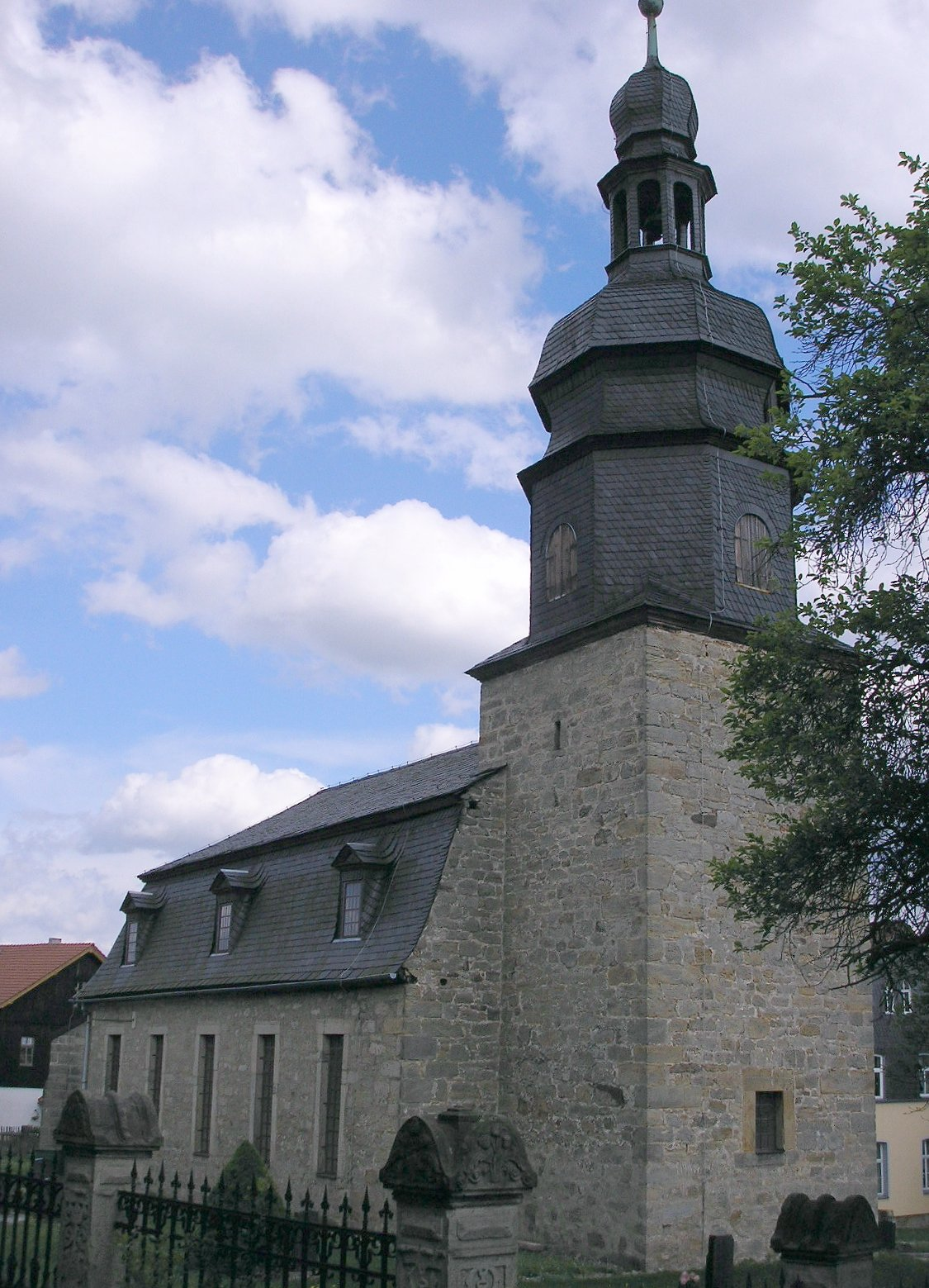 Dorfkirche Singen in der Gemeinde Ilmtal in Thüringen